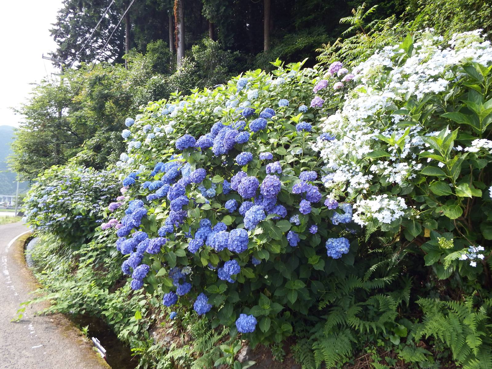 正法寺への道